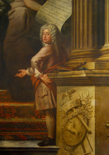 Self-portrait (detail)